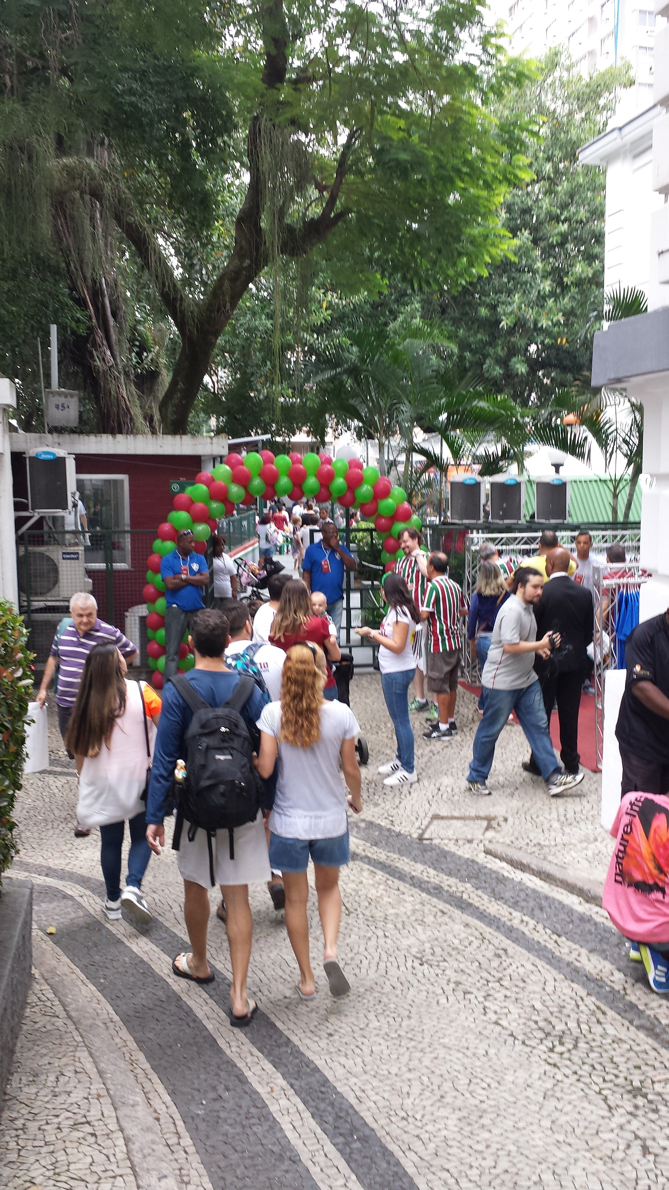 Parque infantil do Fluminense Football Club em 2107-2017.